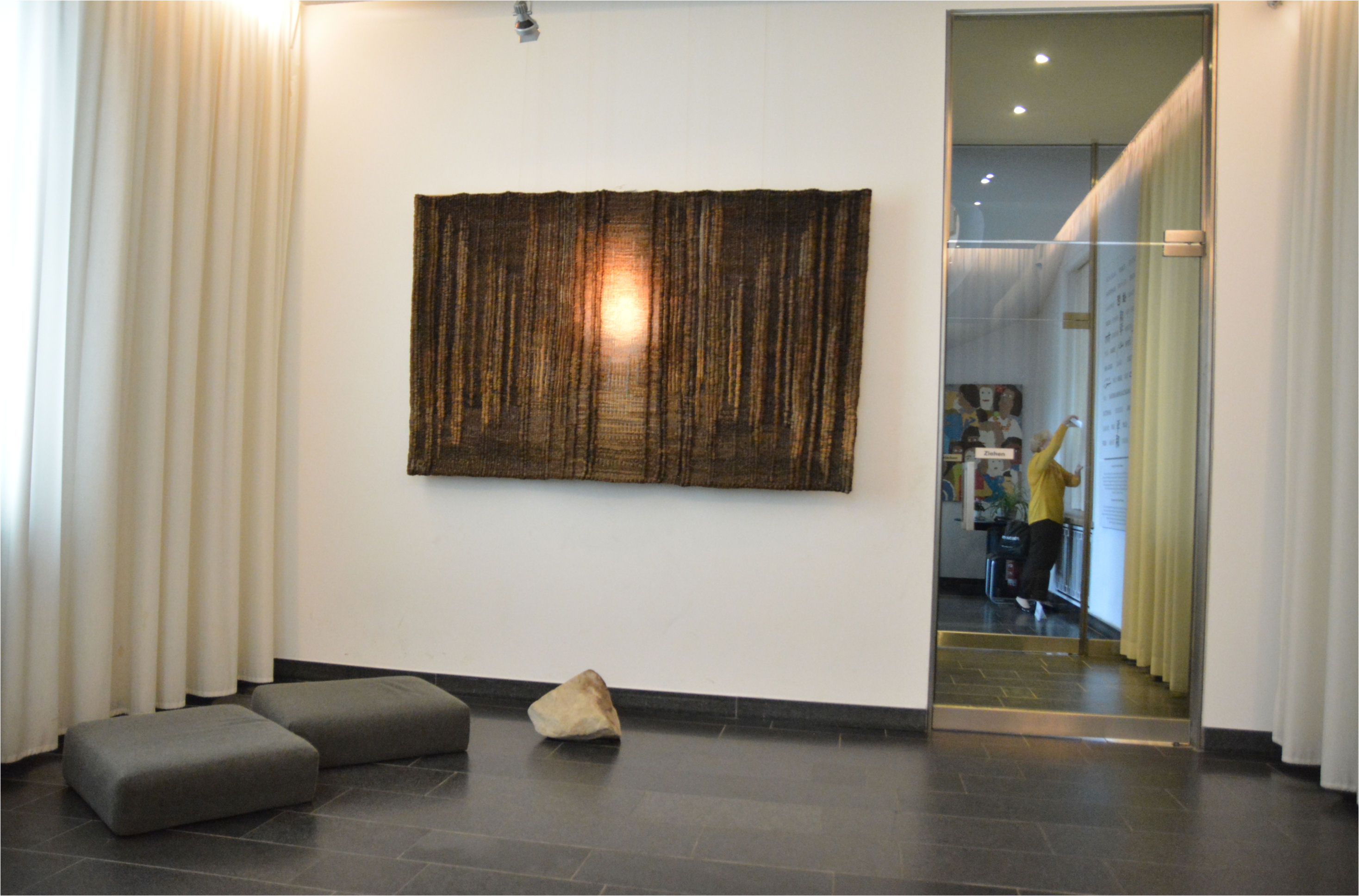 Pokój ciszy przy Bramie Brandenburskiej